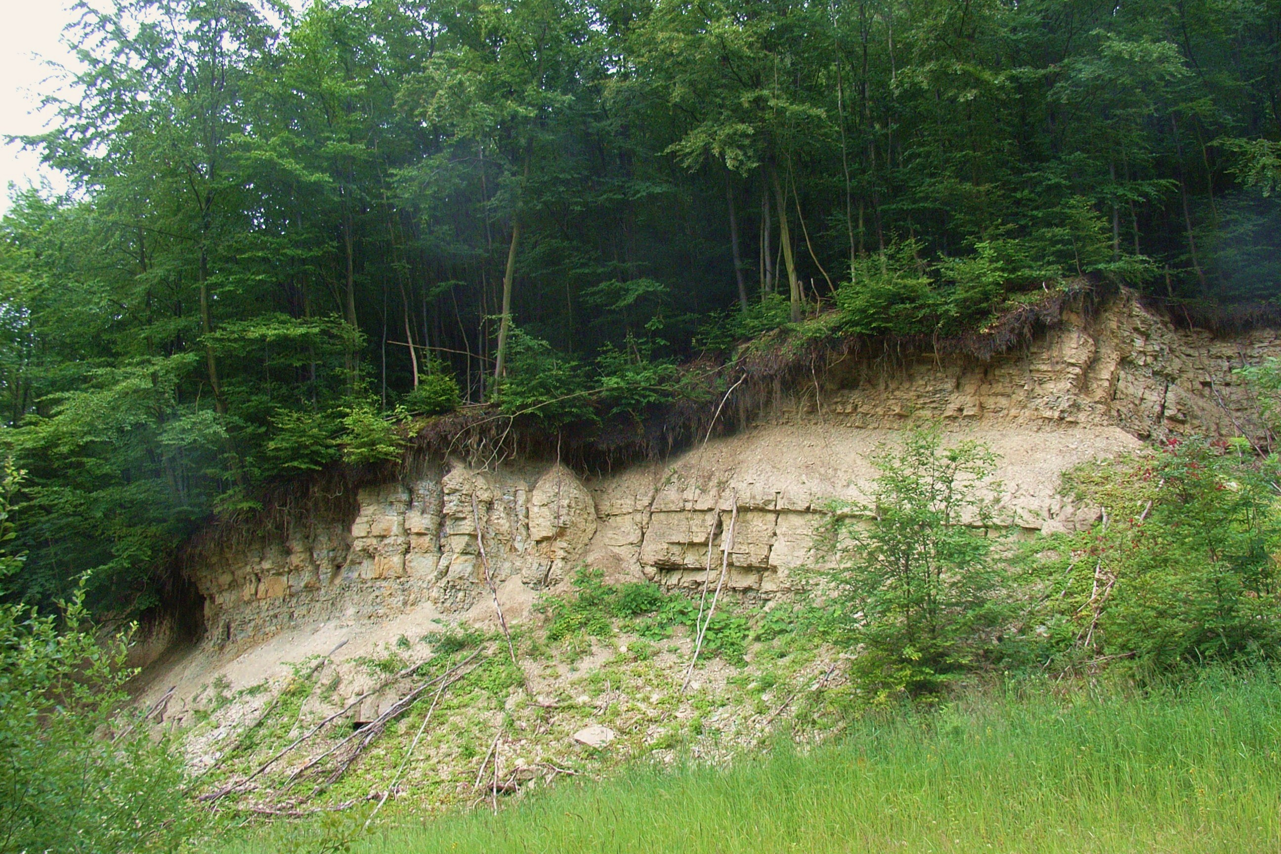 Das Bild zeigt einen Gesteinsaufschluss am rechten Hang des südlichen Quelltals des Hilgenbaches, etwas oberhalb der Stelle, ab dem es ständig Wasser führt. Es handelt sich vermutlich um einen alten Steinbruch zum Wegebau. Gut zu erkennen sind Klüftung und Schichtung des Kalkgesteins, sowie der darauf wachsende Buchenwald.